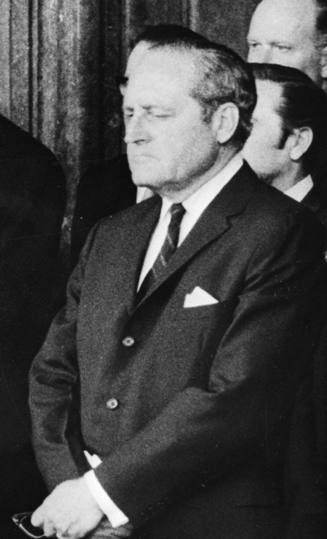 Gerard C. Smith leider van de VS delegatie